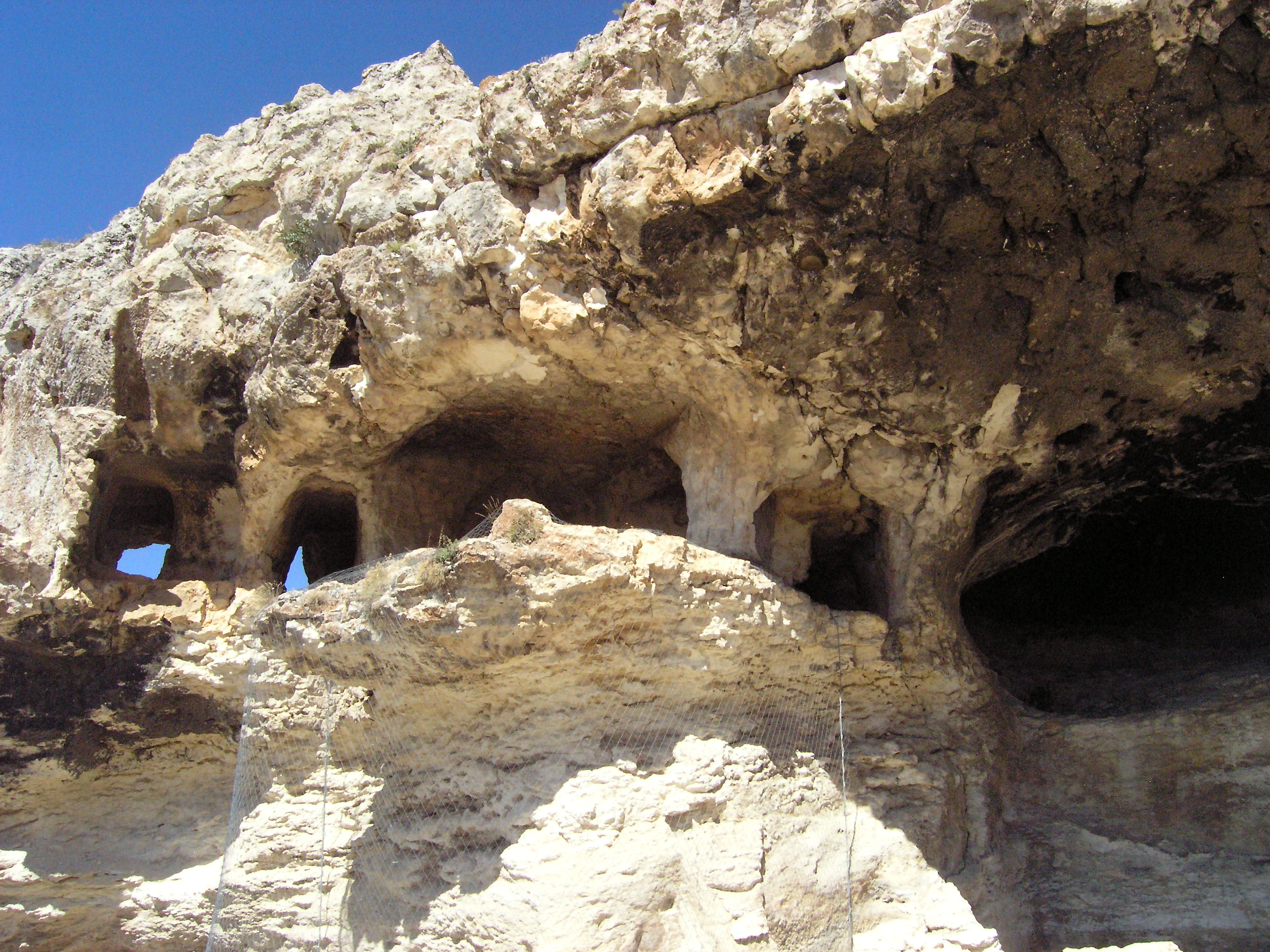 Alahan "Kloster", frühbyzantinische Pilgeranlage in der Türkei, Höhlen-Zellen (ältester Teil)